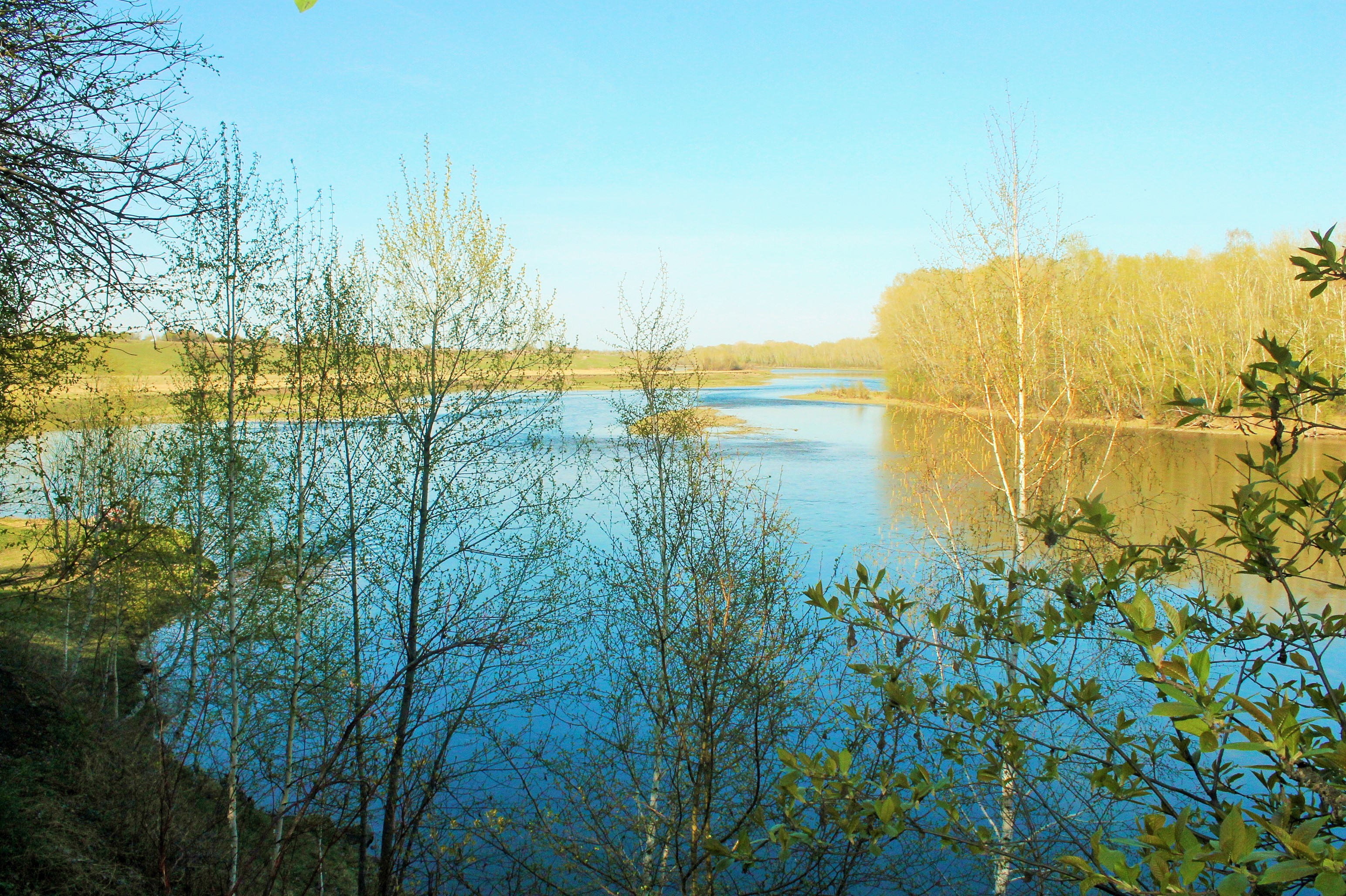 Река Енисей, Алтайский район This image is related to the protected area of Russia number 1910011